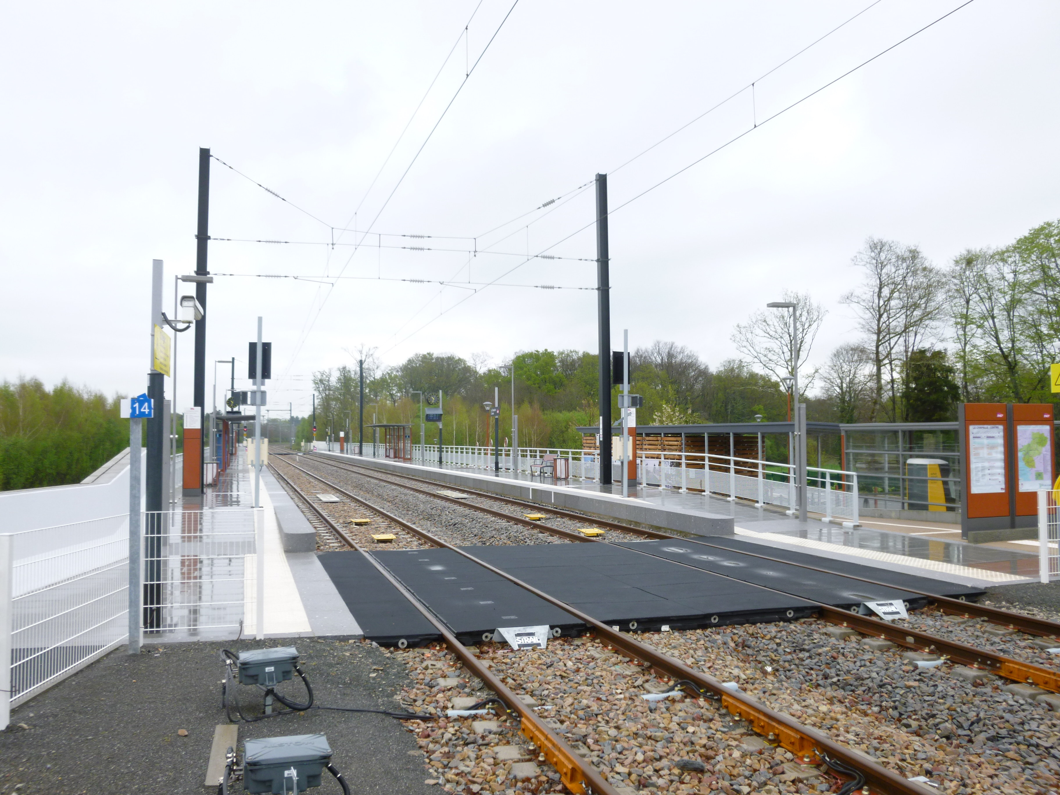 La Gare de La Chapelle-Centre à La Chapelle sur Erdre (44)